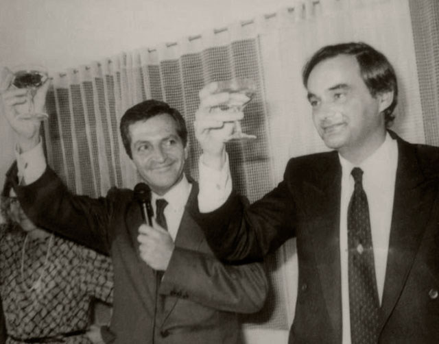 El ex presidente Adolfo Suárez y Francisco Javier Moldes Fontán celebrando el éxito del CDS en las elecciones de 1986, en la que ambos se hicieron con el acta de diputado del Congreso.